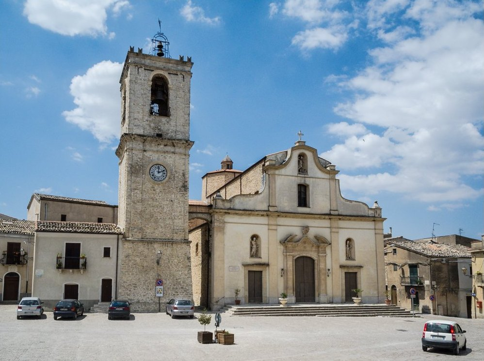 Palazzo Adriano, Sicily